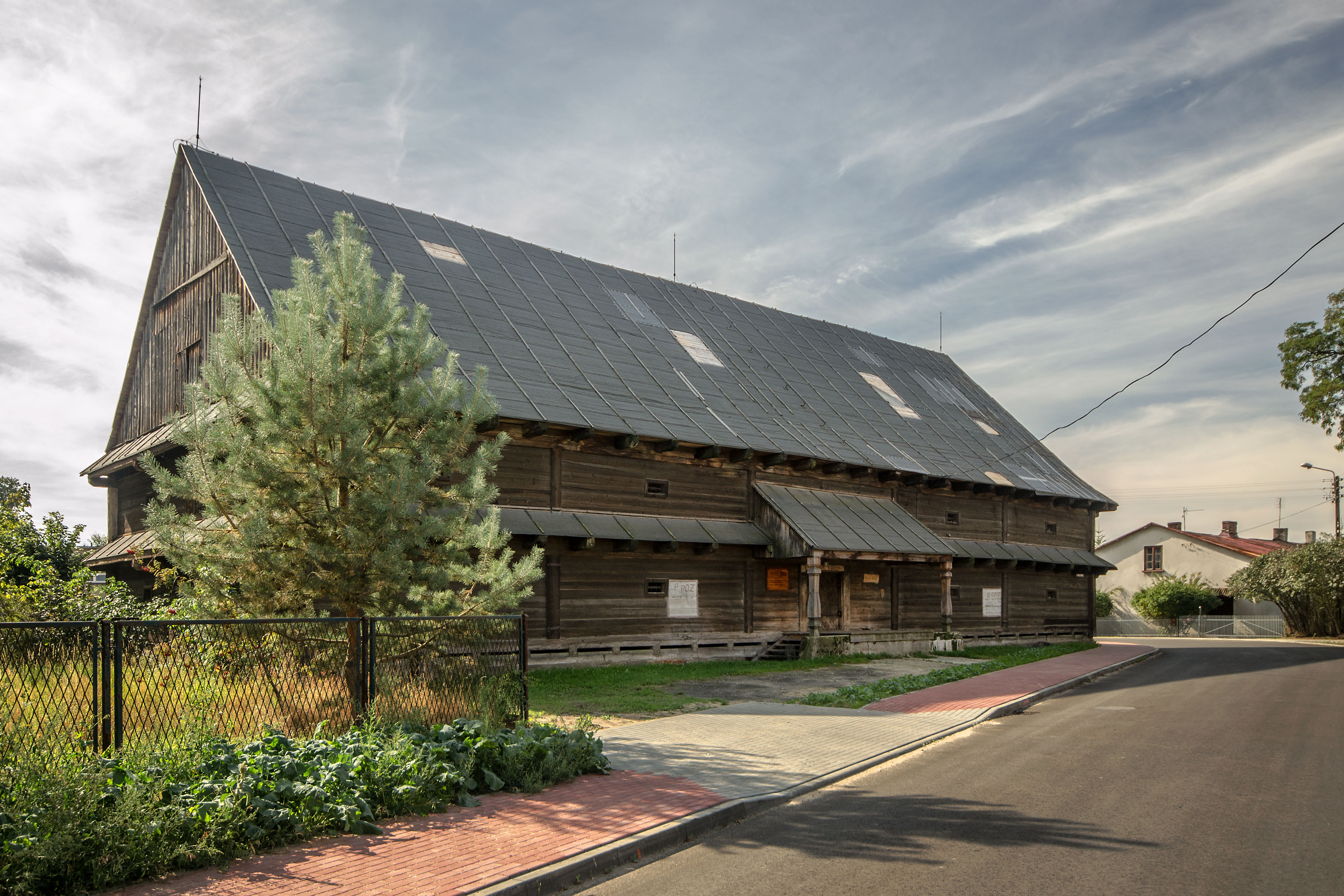 Skomlin, spichrz, 1777